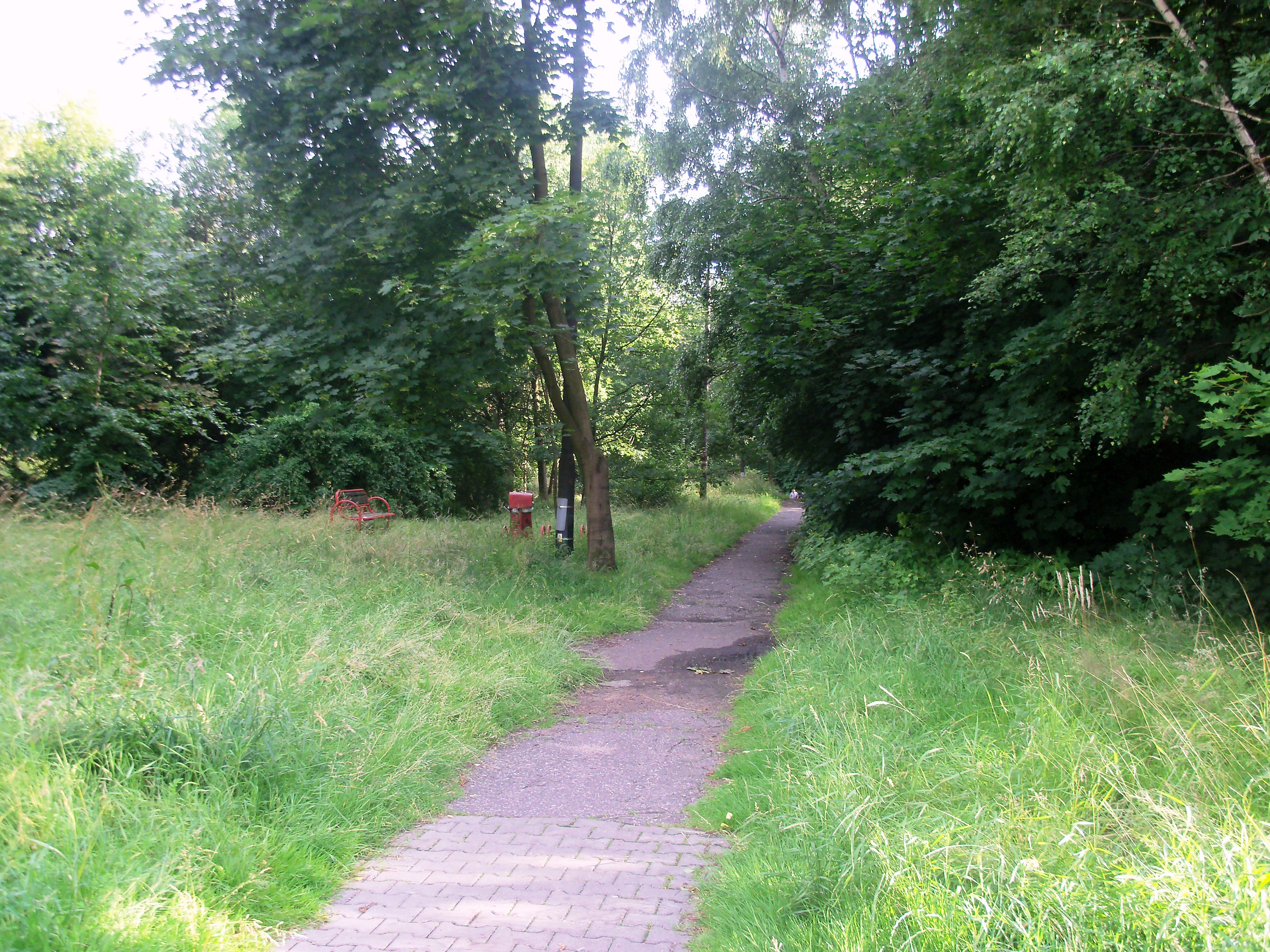 Park Murckowski w Katowicach-Murckach